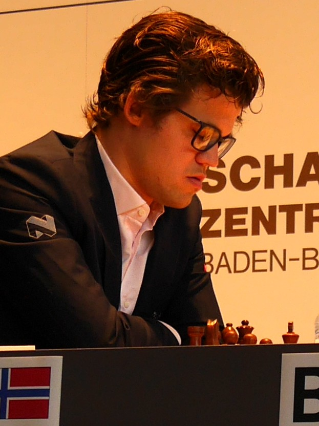 Magnus Carlsen, Grenke Chess Classic 2017 in Karlsruhe.